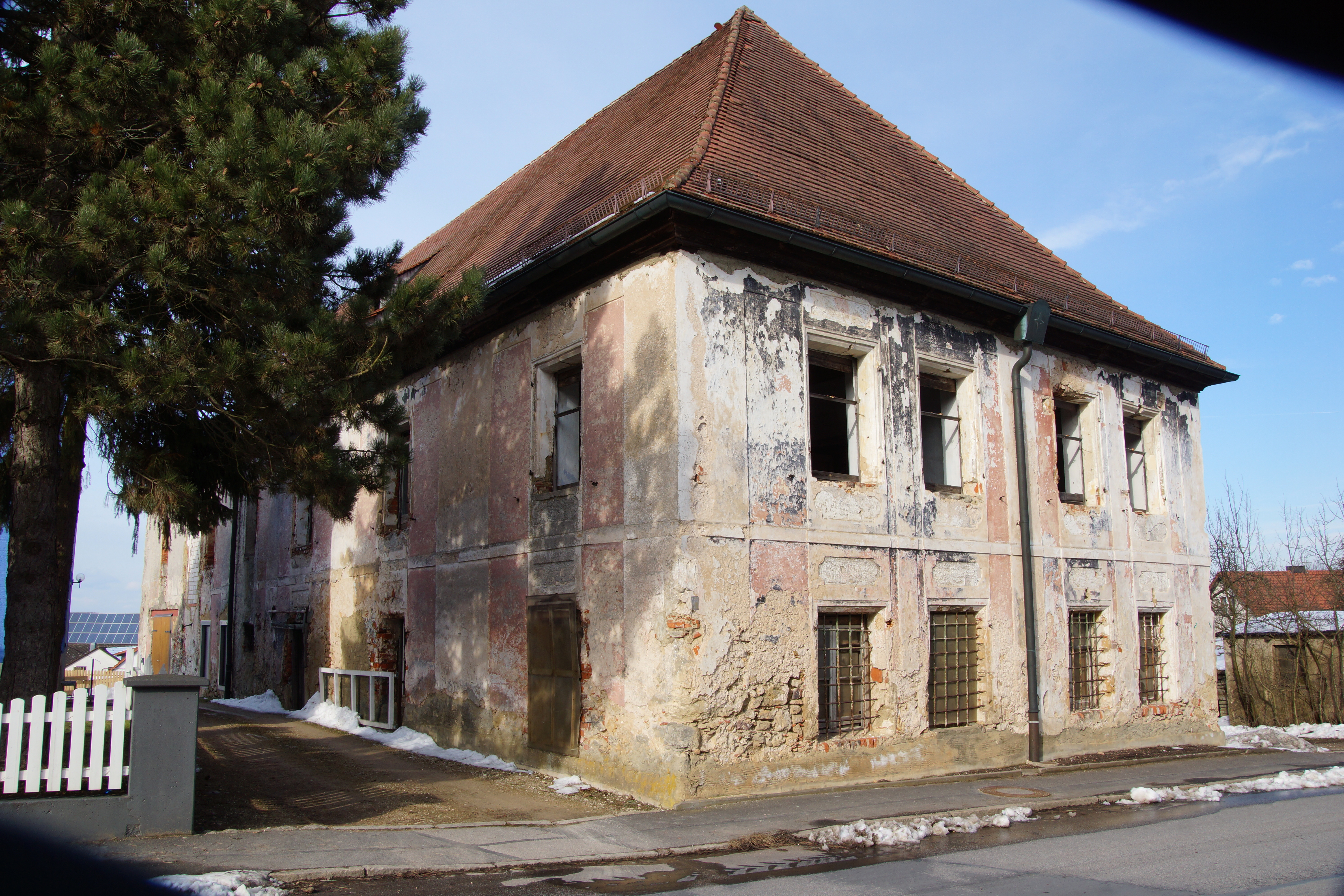 Der Edelmannssitz in Hohenkemnath bei Amberg